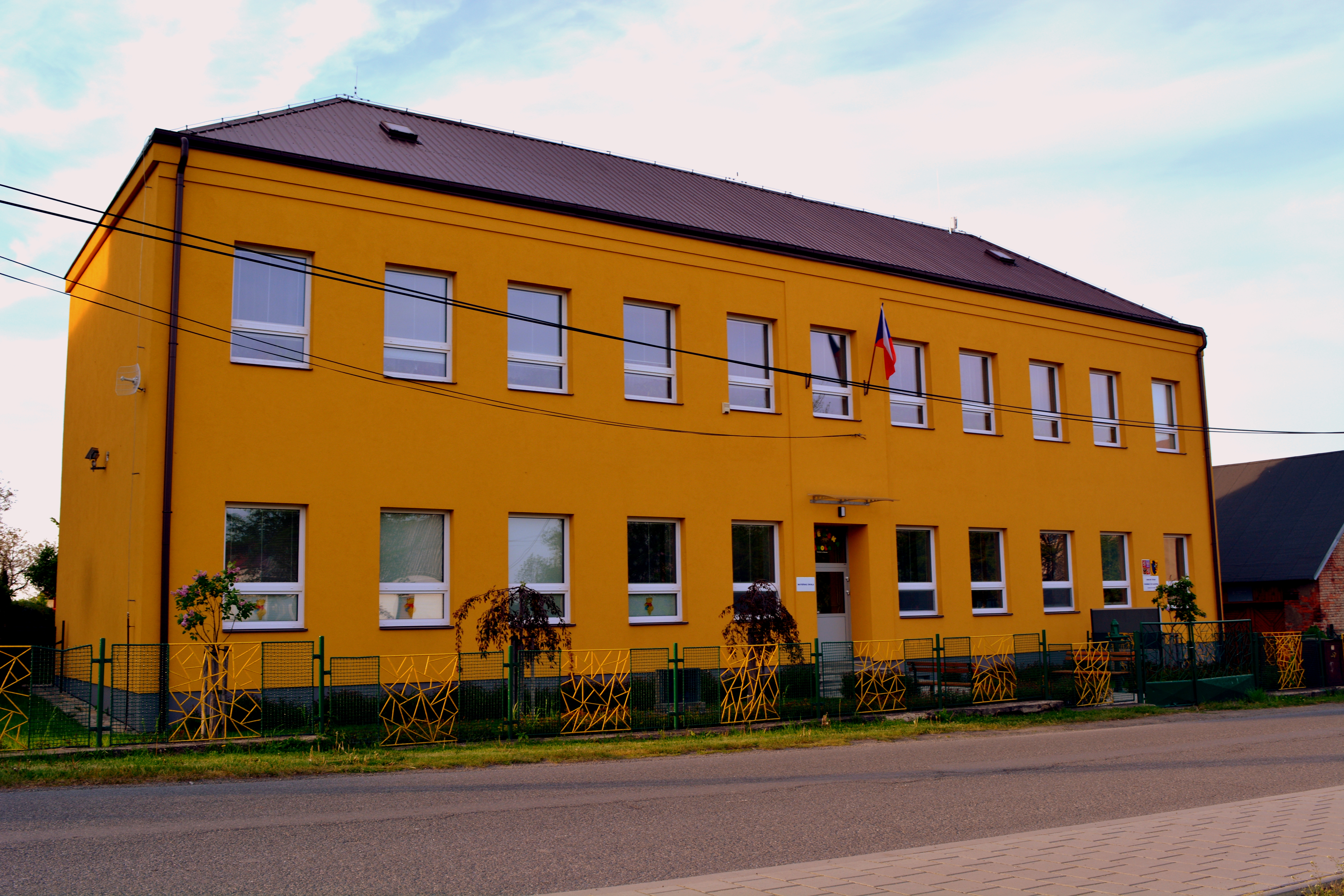 Čermná ve Slezsku, pohled na budovu obecního úřadu a mateřské školy.